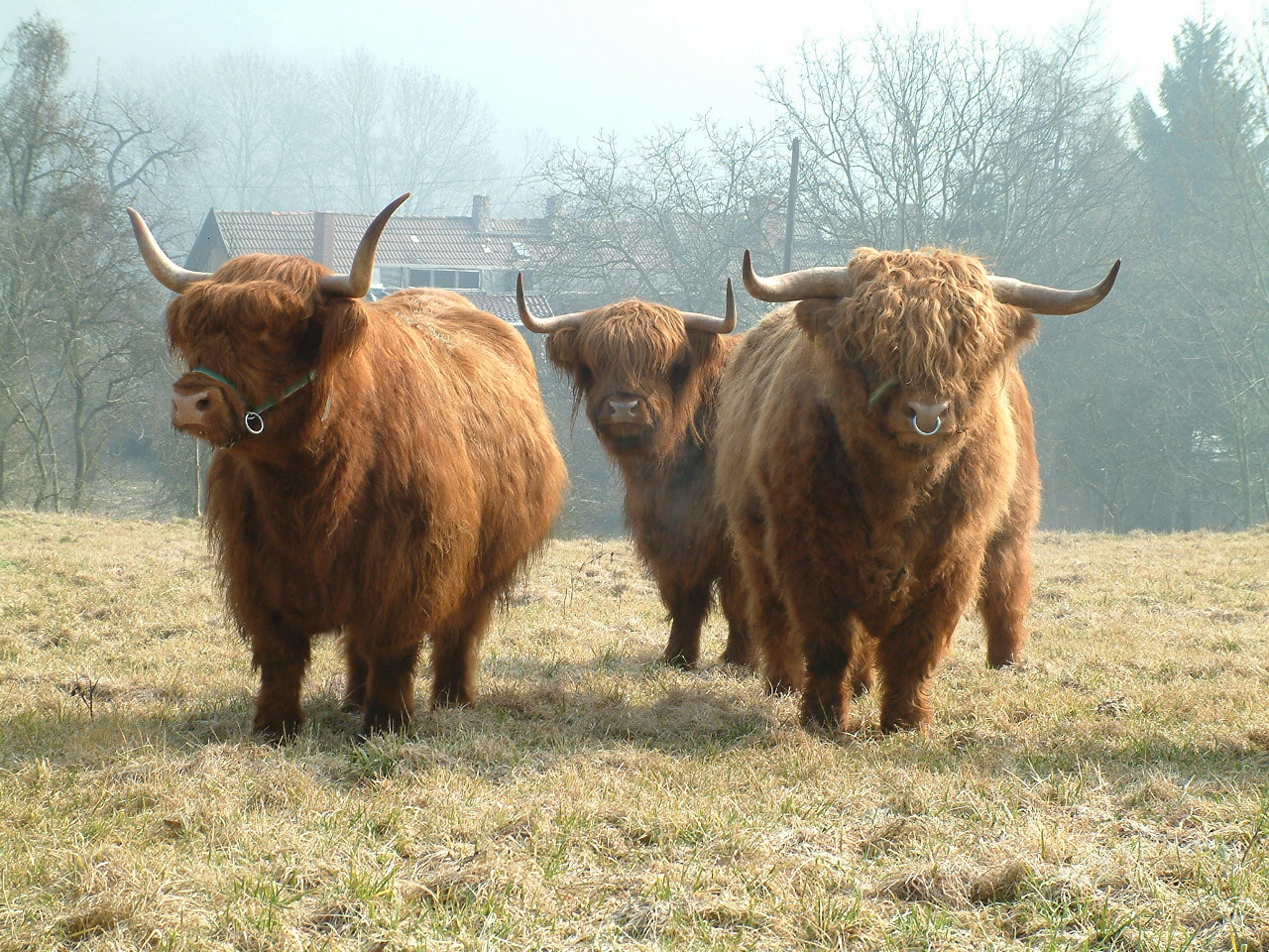 Geschlechtsspezifische Hornstellung bei Schottischen Hochlandrindern: Bei den Kühen Maxi v. d. Ronneburg und Nelly 3 v. Lehstener Moor ausladend nach oben geschwungen und beim Bullen Orson v. Wotanstein (rechts) fast waagerecht nach vorne.